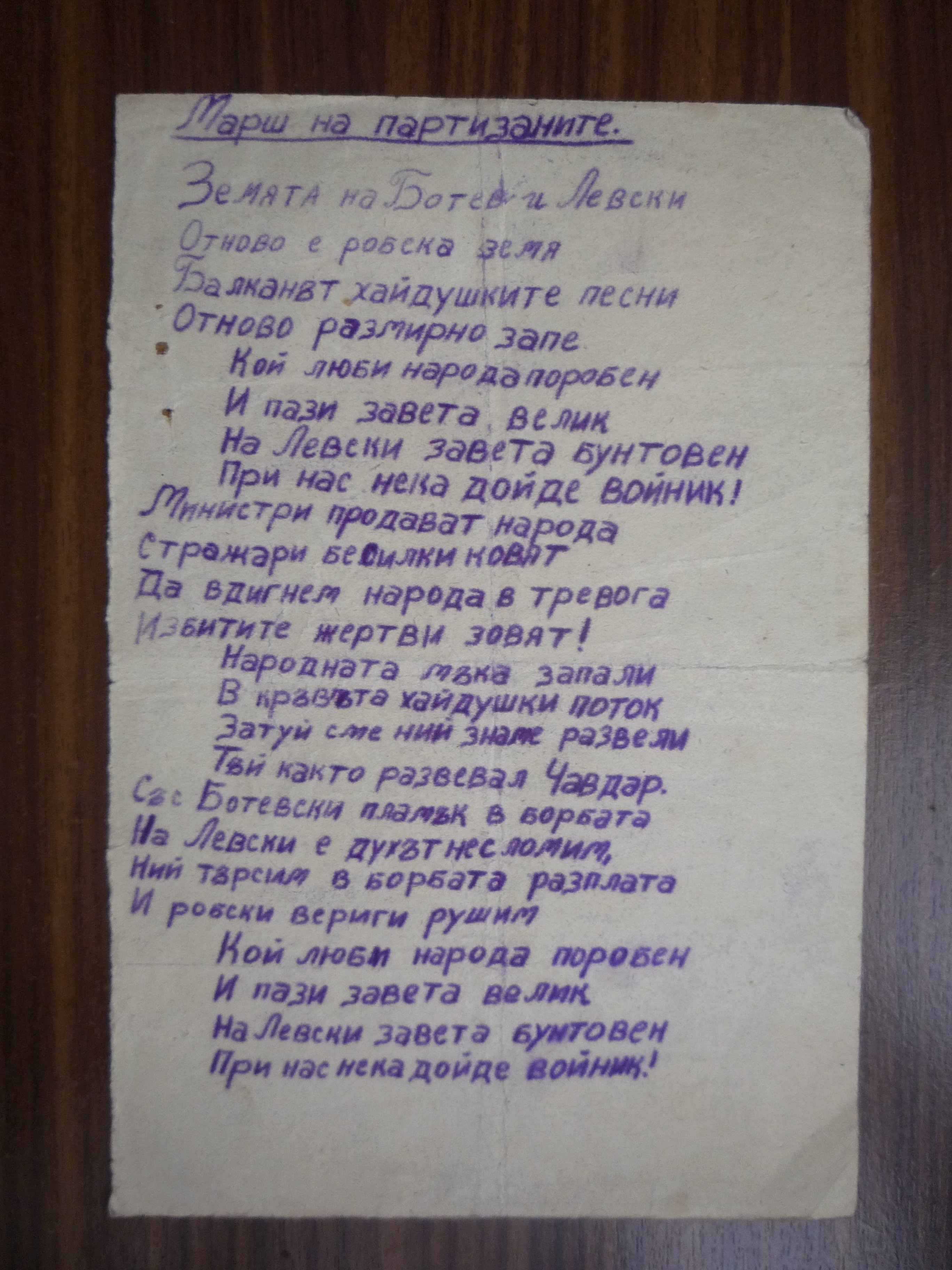 Позив на Партизански отряд "Христо Кърпачев", 1944 г., "Марш на партизаните" (Чавдарци), автор Х. Кърпачев.